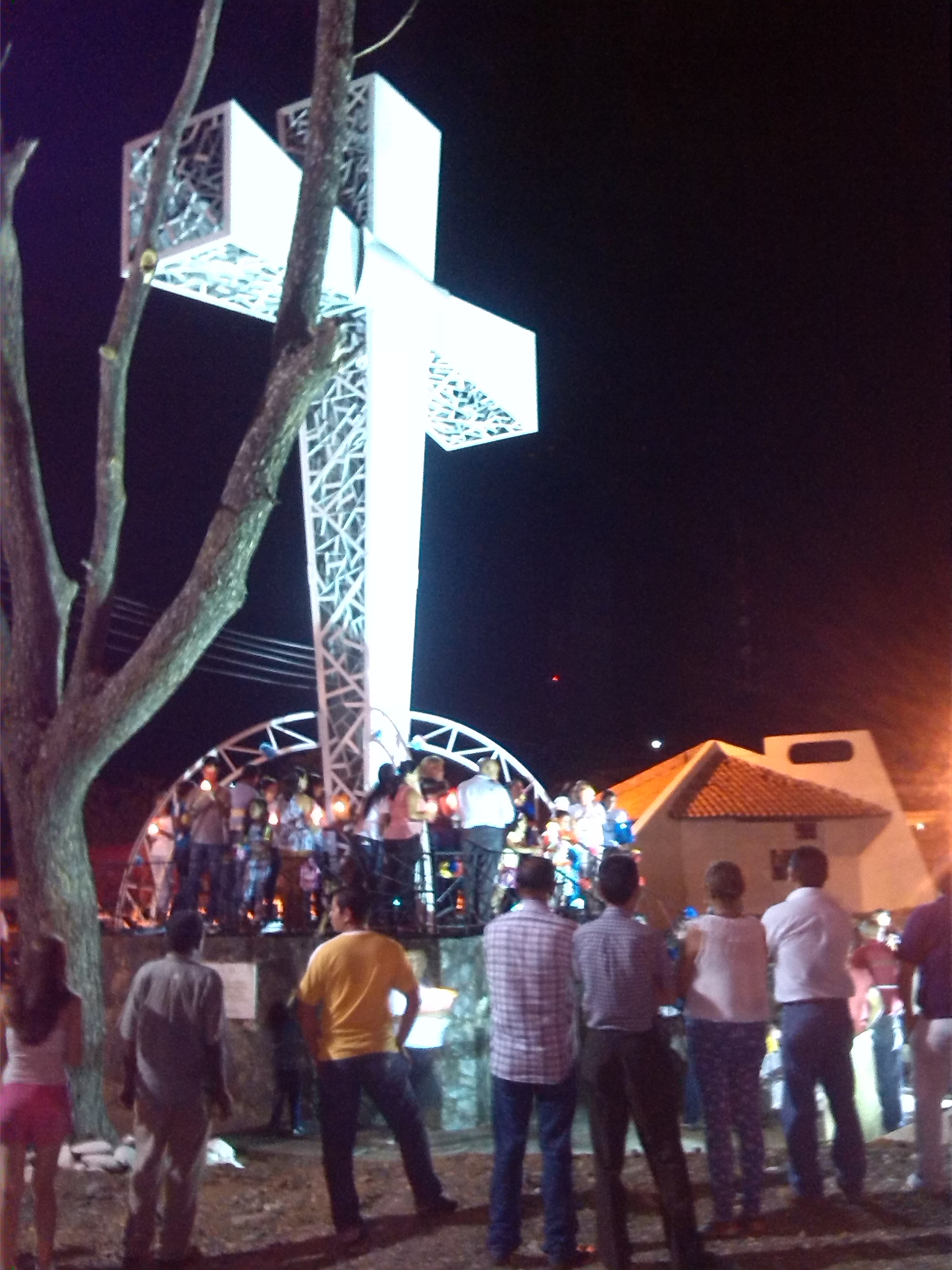 Una imponente Cruz de metal indica el lugar en el cual hace 66 años el Sr. Rodríguez comenzó la tradición del Velorio de la Cruz de Mayo en Araure, estado Portuguesa.